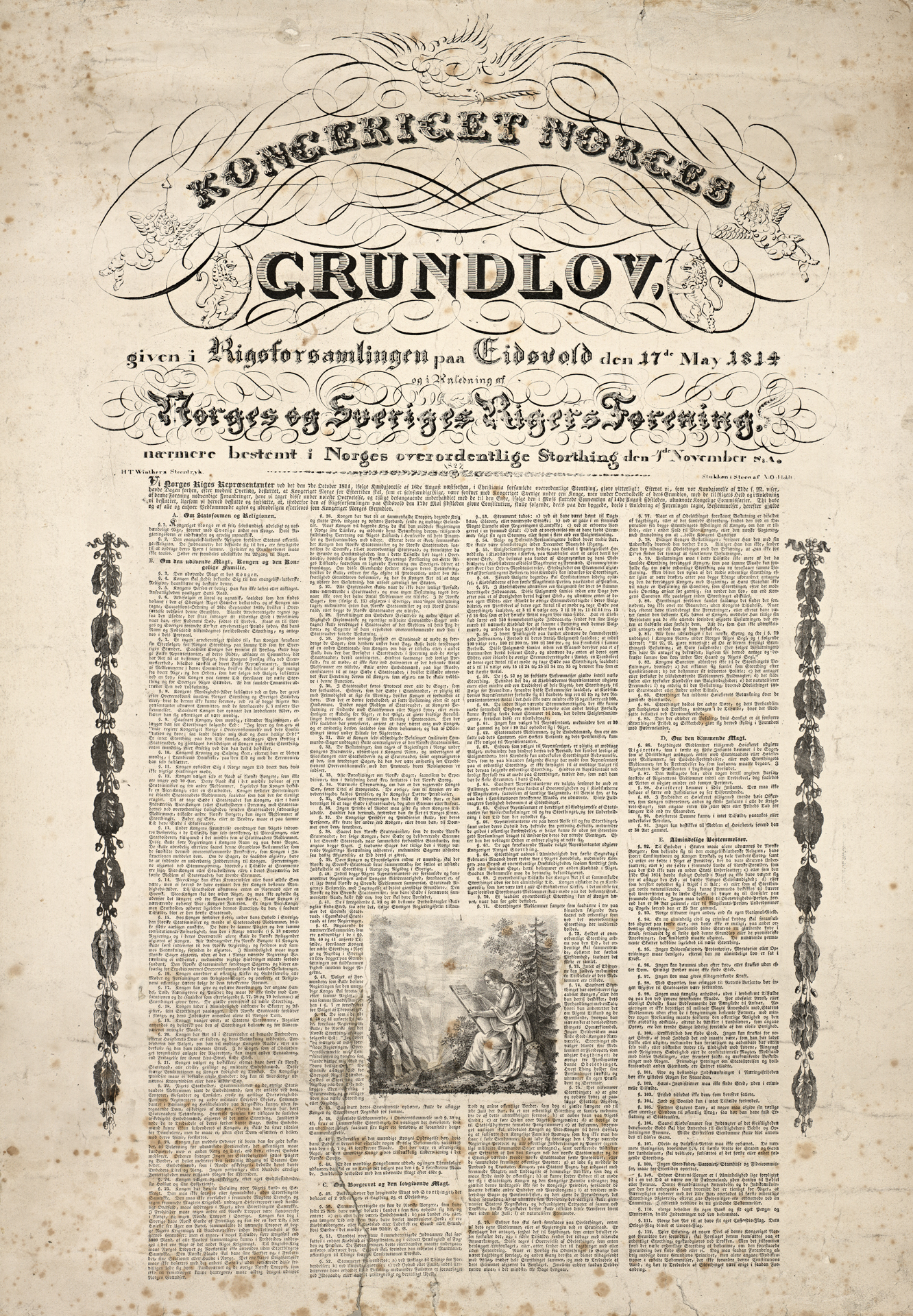 Tittel / Title: Kongeriget Norges Grundlov, given i Rigsforsamlingen paa Eidsvold den 17de May 1814 og i Anledning af Norges og Sveriges Rigers Forening, nærmere bestemt i Norges overordentlige Storthing den 4de November s.A. Beskrivelse / Description: Plakat / Poster Dato / Date: 1827 Kreditering / Credit: A.O. Holdt (litograf) Trykkeri / Printing House: H.T. Winthers Steentryk Trykkemetode / Printing method: Litografi, 70 x 48,5 cm Eier / Owner Institution: Nasjonalbiblioteket / National Library of Norway Lenke / Link: Bildesignatur / Image Number: plktr_05878